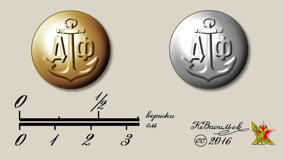 Российская империя. Добровольный флот. Пуговицы Добровольного флота образца 1881 года. Первичные источники Полное собрание законов Российской Империи, Собрание Второе, том 55, №61778 от 23 февраля 1881 года.